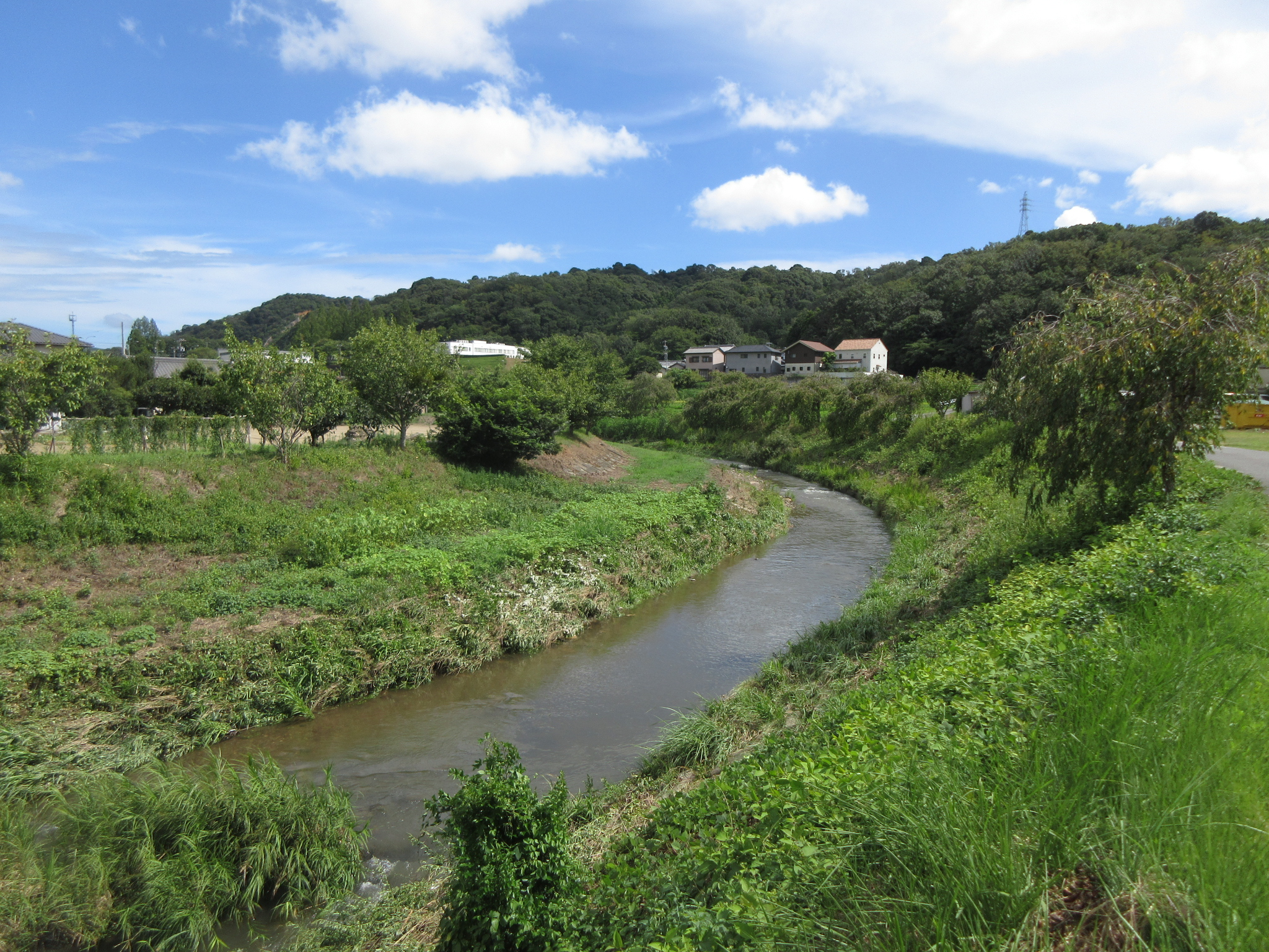 鉢地川（岡崎市保母町）